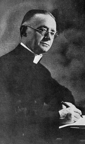 Lionel-Adolphe Groulx (Chenaux, 13 janvier 1878 - Vaudreuil, 23 mai 1967) aussi connu sous ses titres d'abbé Groulx ou de chanoine Groulx, était un prêtre catholique, un historien, un écrivain, et nationaliste québécois. ca. 1925 - 1935 / Montréal, Quebec — 1 item — 5.50 x 3.50 in.